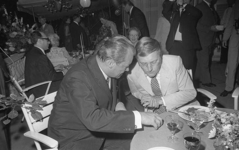 Sommerfest des Bundeskanzlers im Park des Palais Schaumburg